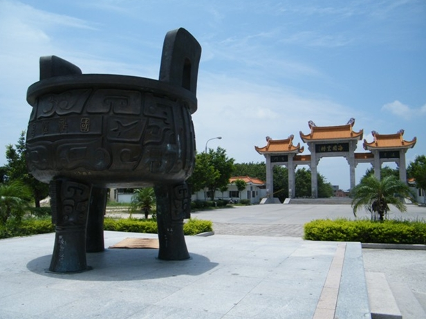 青云岩风景区入大门处